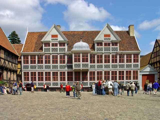 Møntergården den gamle by Århus